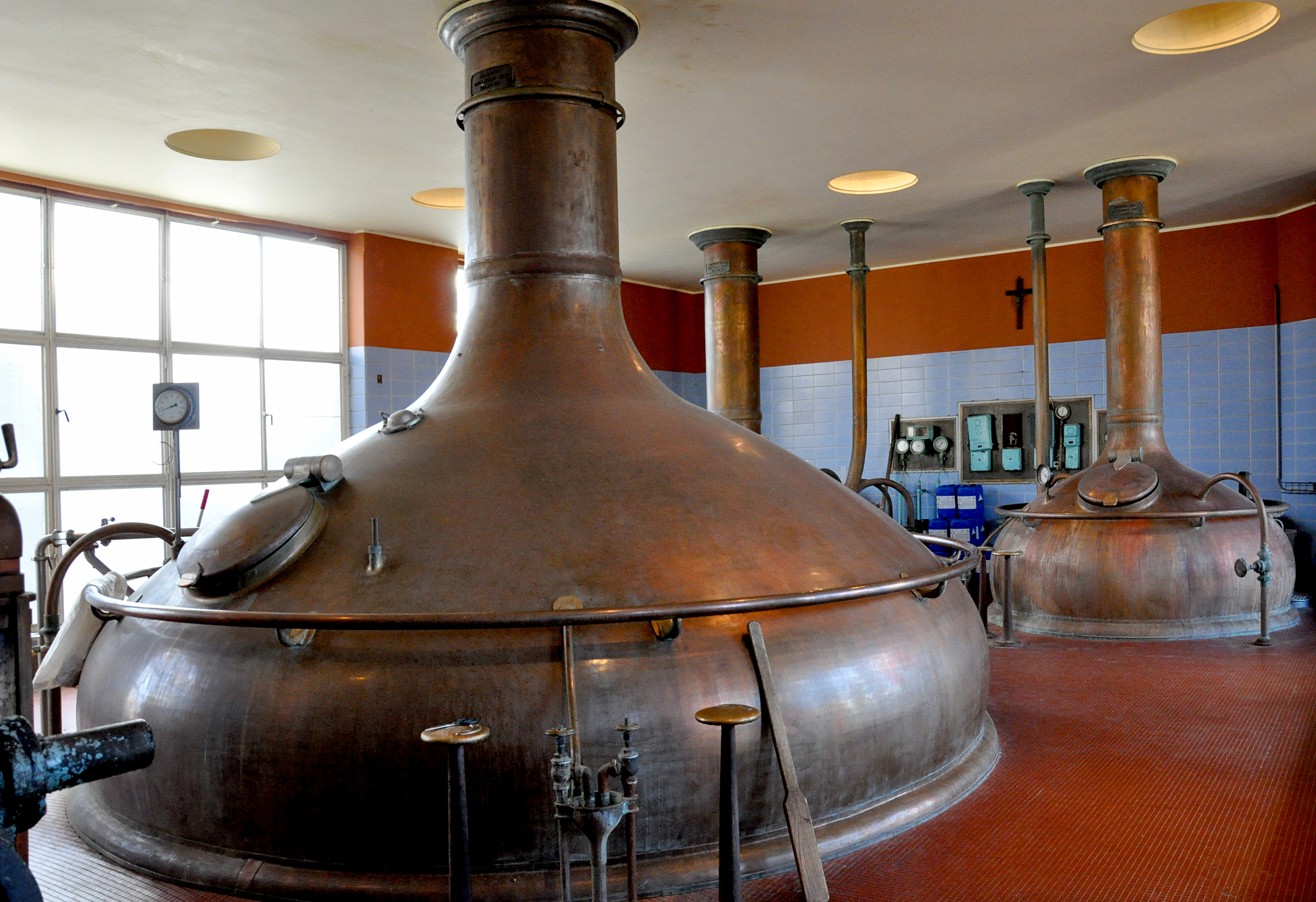 Brouwzaal Het Anker, Mechelen